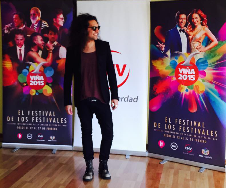 Presentazione Festival Vina del Mar 2015